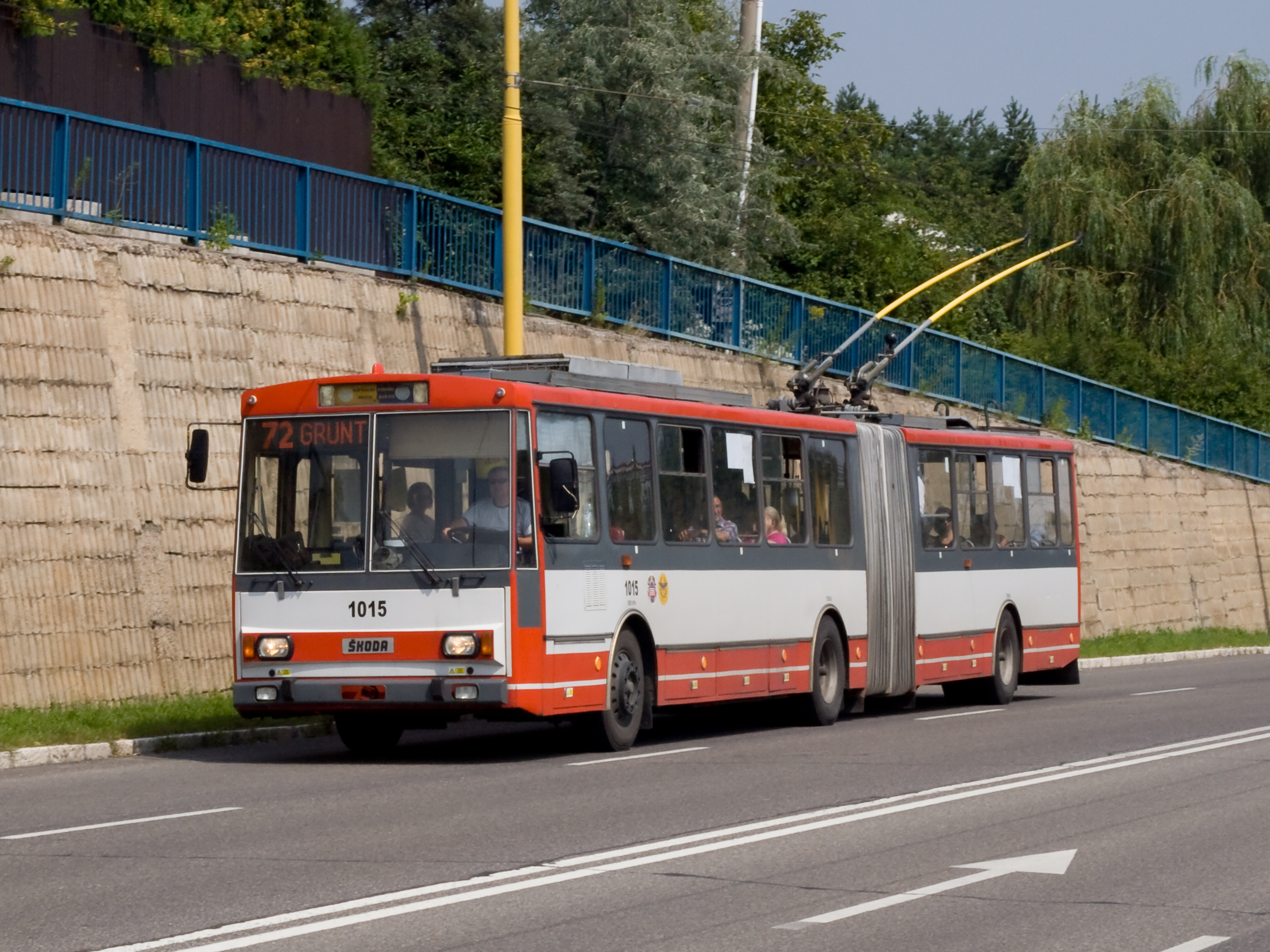 Škoda 15 Tr eč. 1015 na lince 72 mezi stanicemi Hodonínska a Diamantová